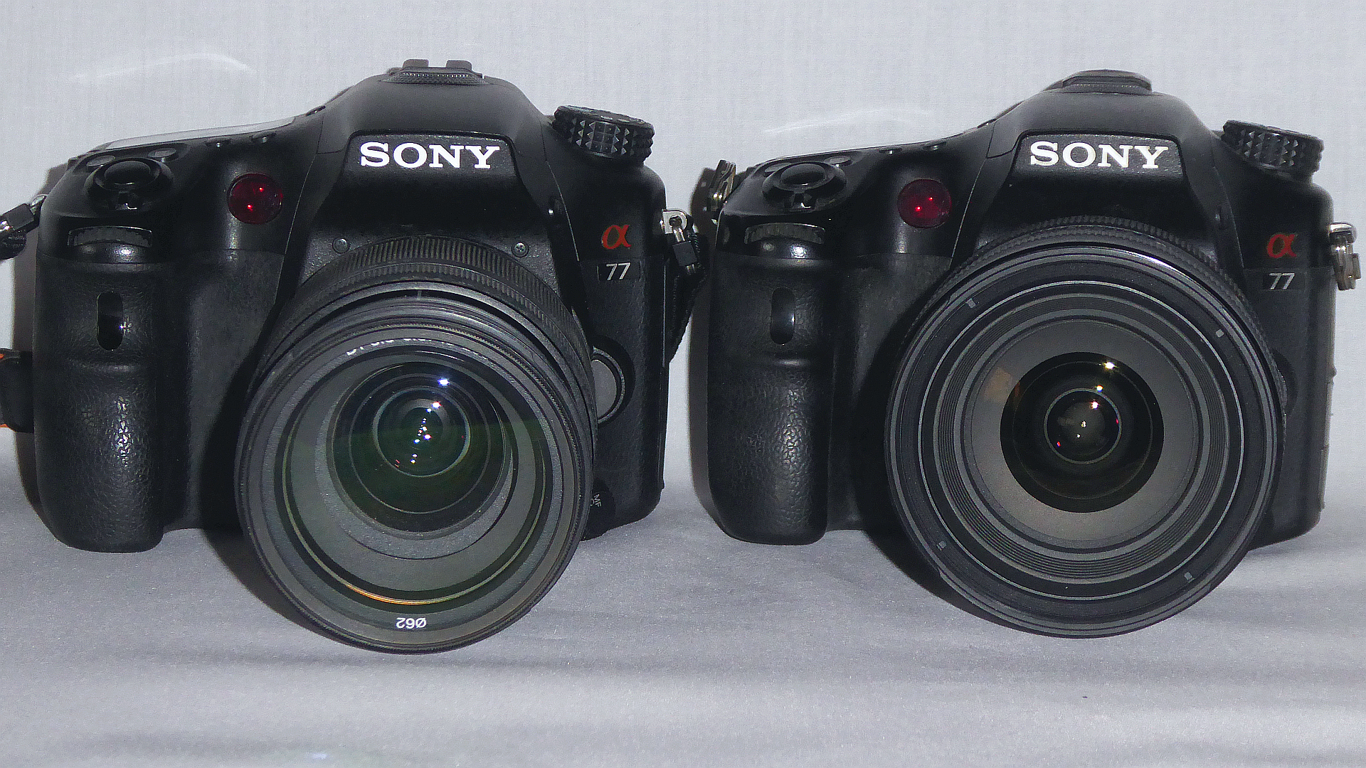 Digitale Spiegelreflexkamera / Systemkamera Sony A77 bzw. Sony SLT-A77 alpha. Kamera mit starrem durchlässigem Spiegel, fest verbautem GPS, für Sony and Zeiss lenses or a-mount lenses - Foto Wolfgang Pehlemann P1290783